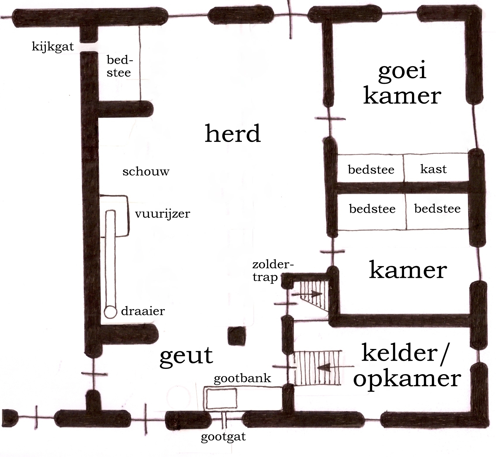 plattegrond van het voorhuis van de Plashoeve 1750